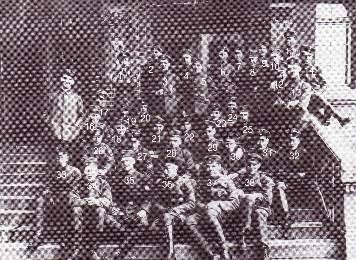 Fotografie von Zeitfreiwilligen des Hallenser Senioren-Convents vor der Oberrealschule Halle am 15. März 1920.